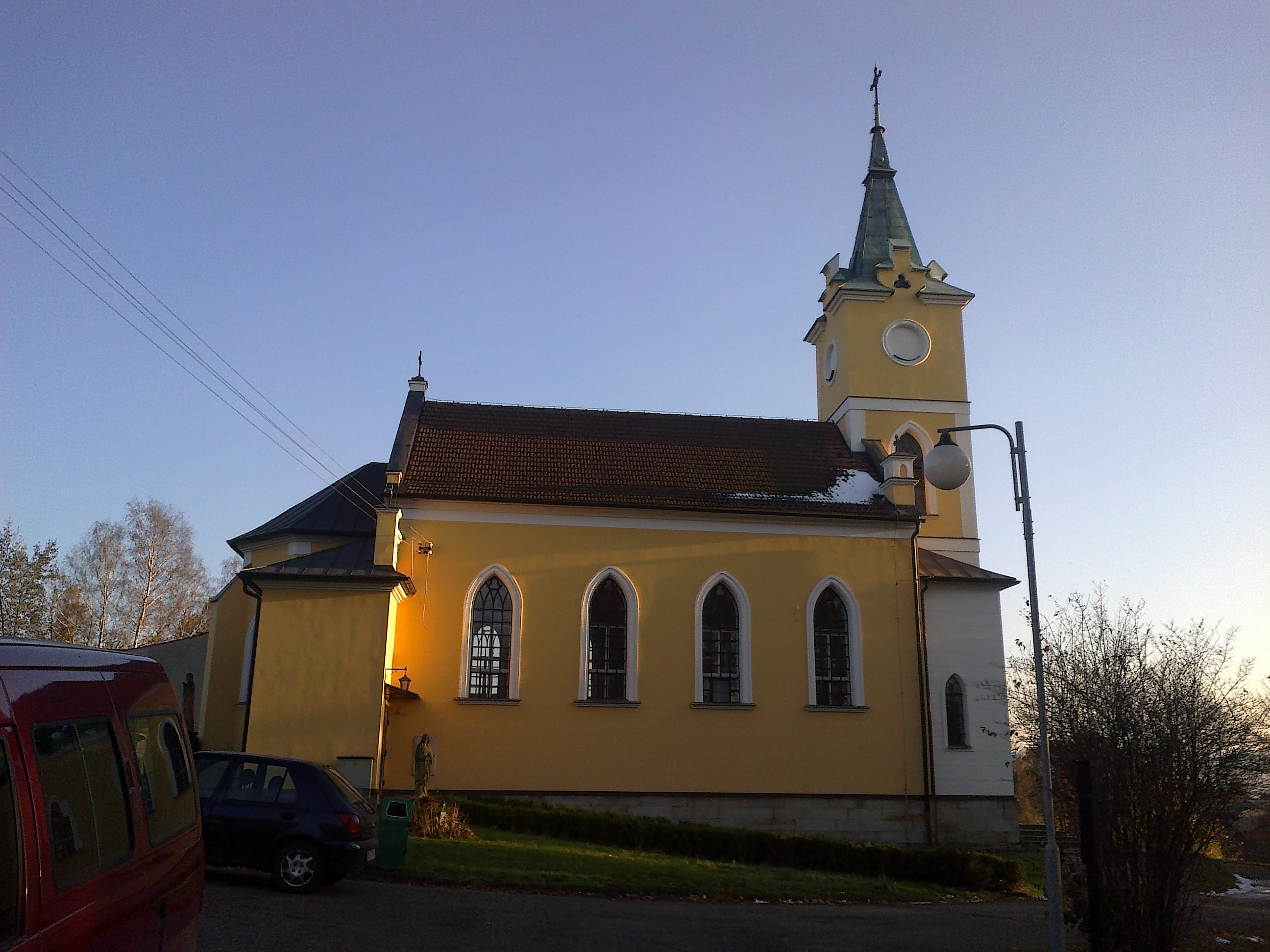 Kostel Velké Poříčí